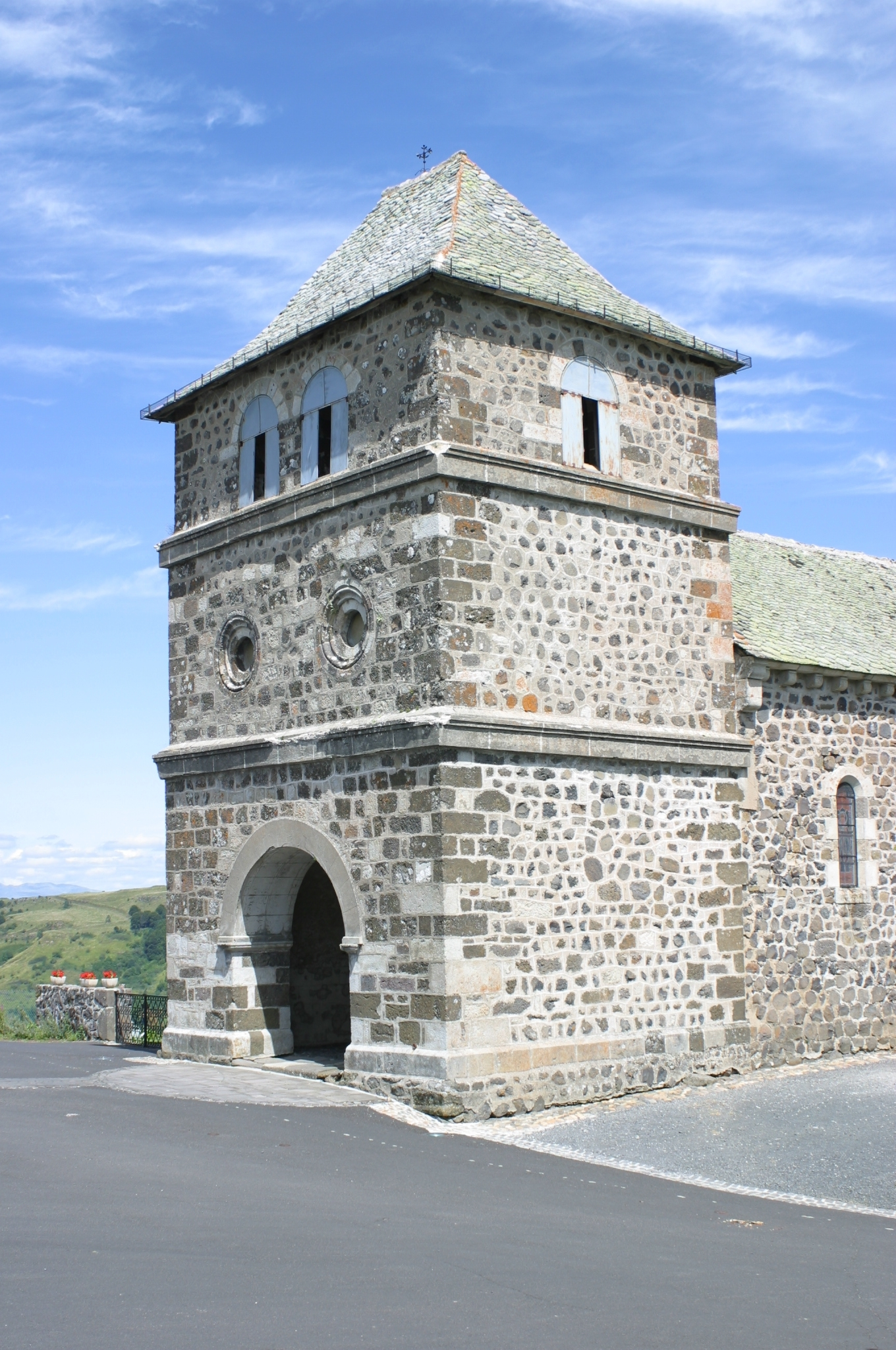 porche de l'église de Collandres